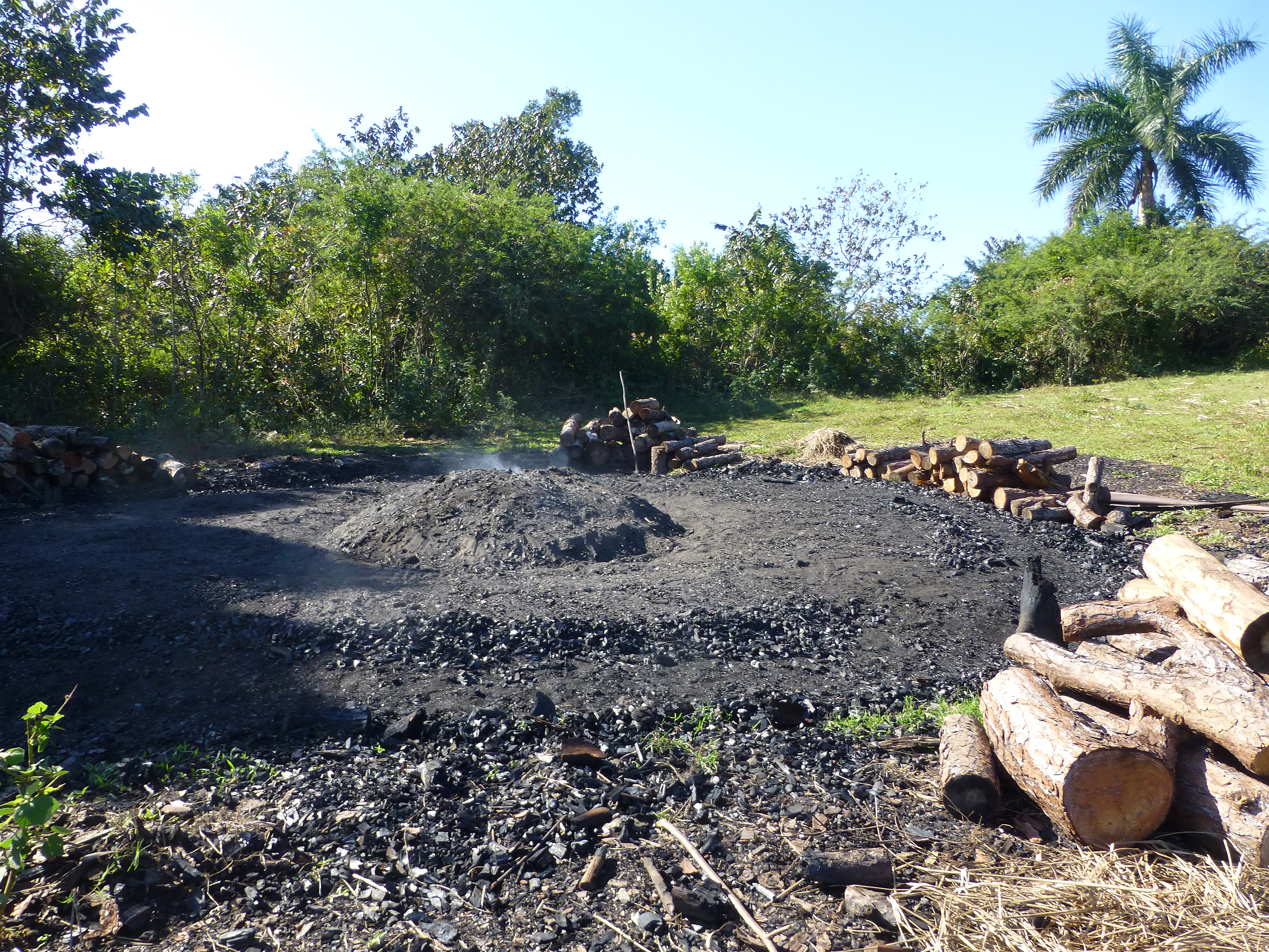 Fabrication du charbon de bois dans la vallée de Viñales (Cuba)